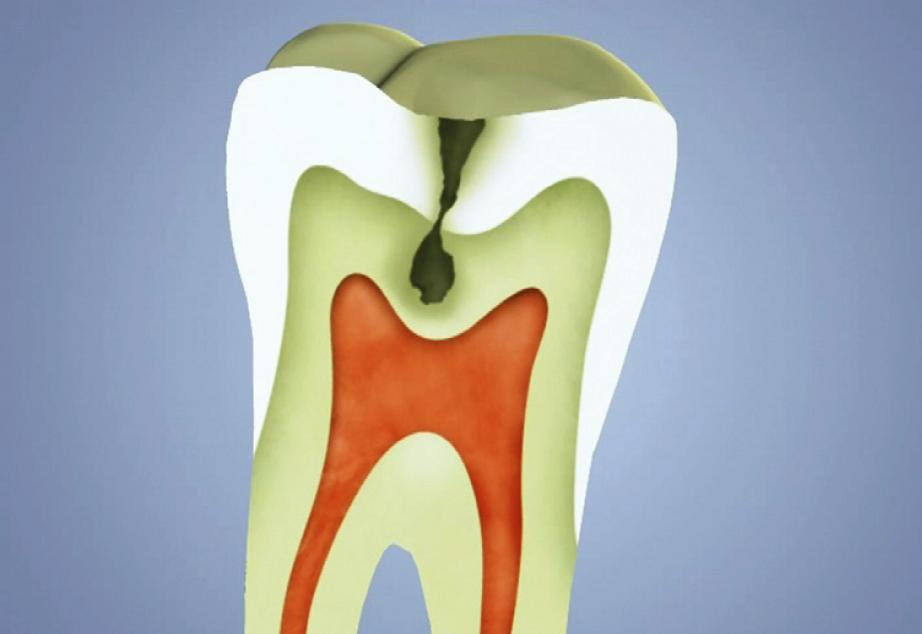 3.stadium zubního kazu